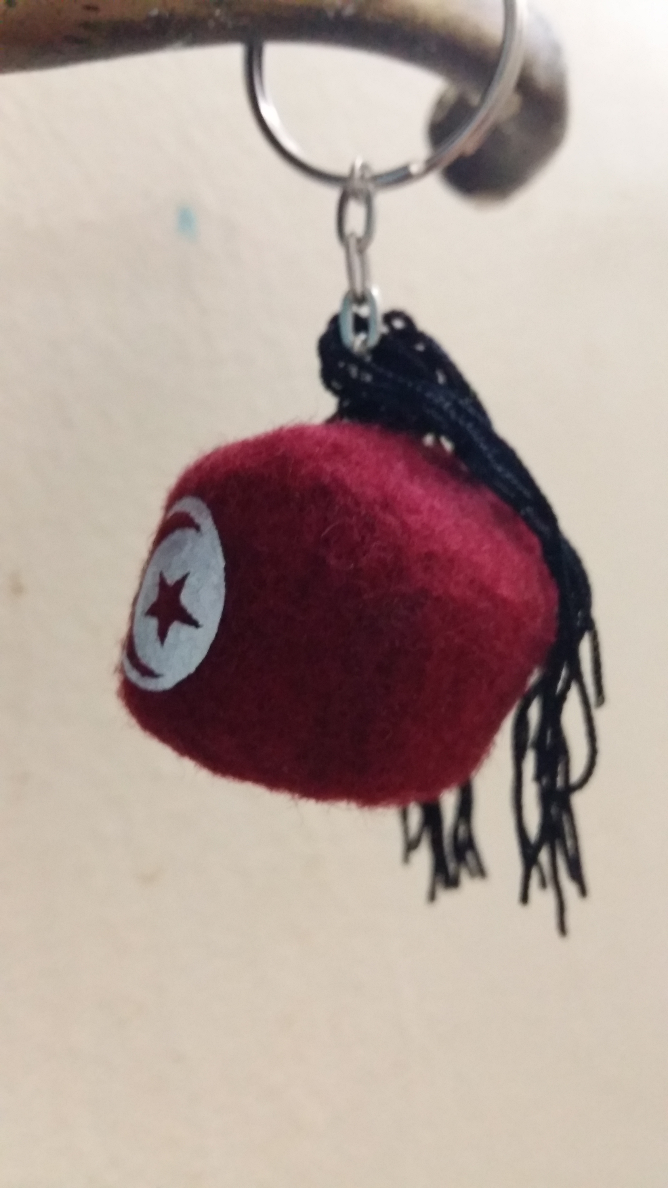 chachia Tunisinne This is an image of Cultural Fashion or Adornment from Tunisia